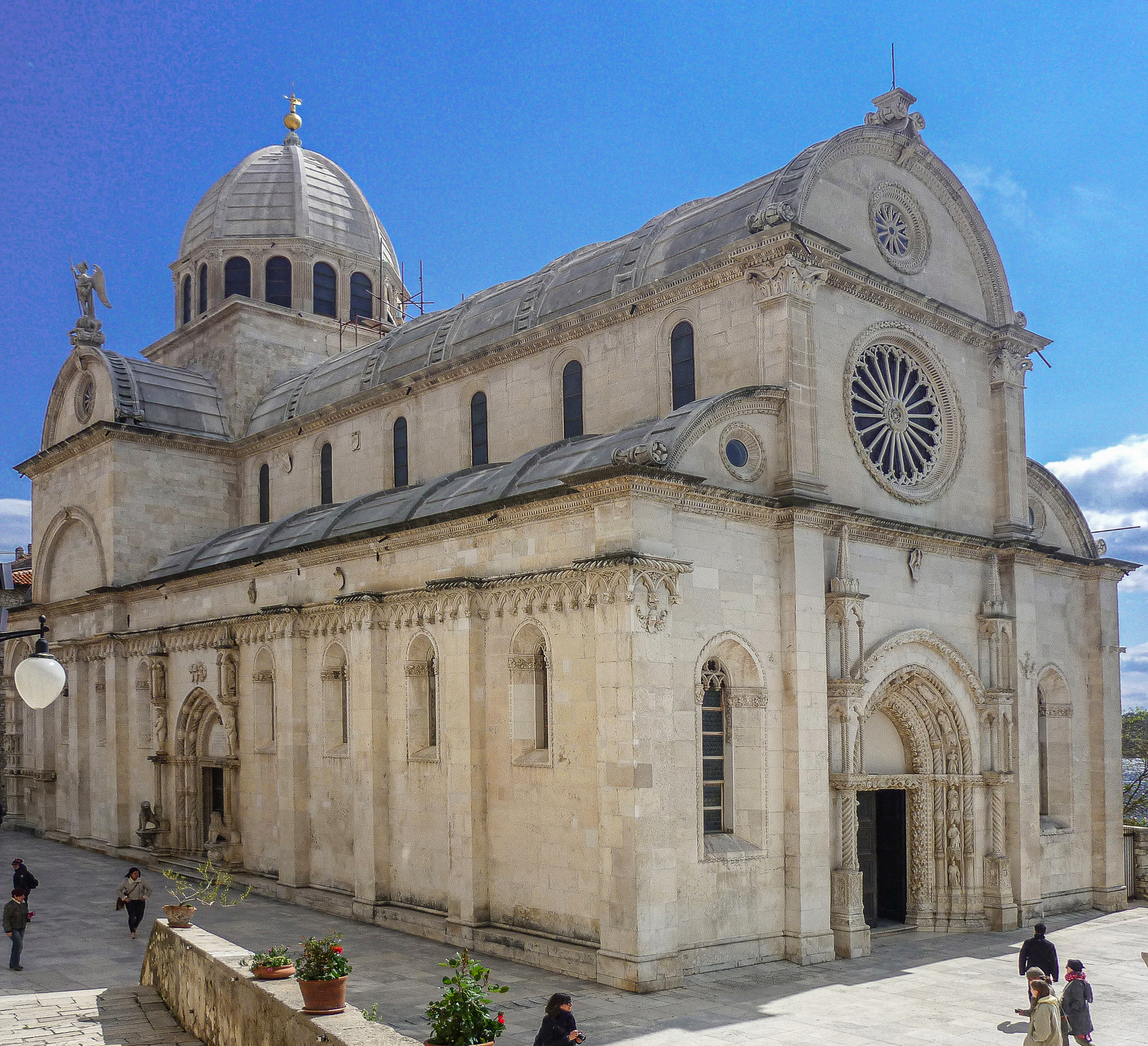 Kathedrale des hl. Jakob in Šibenik (1431–1536). Baumeister: Giorgio da Sebenico (kroat.: Juraj Dalmatinac) und Niccolò di Giovanni Fiorentino (kroat.: Nikola Firentinac)